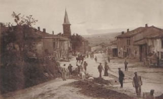 installation